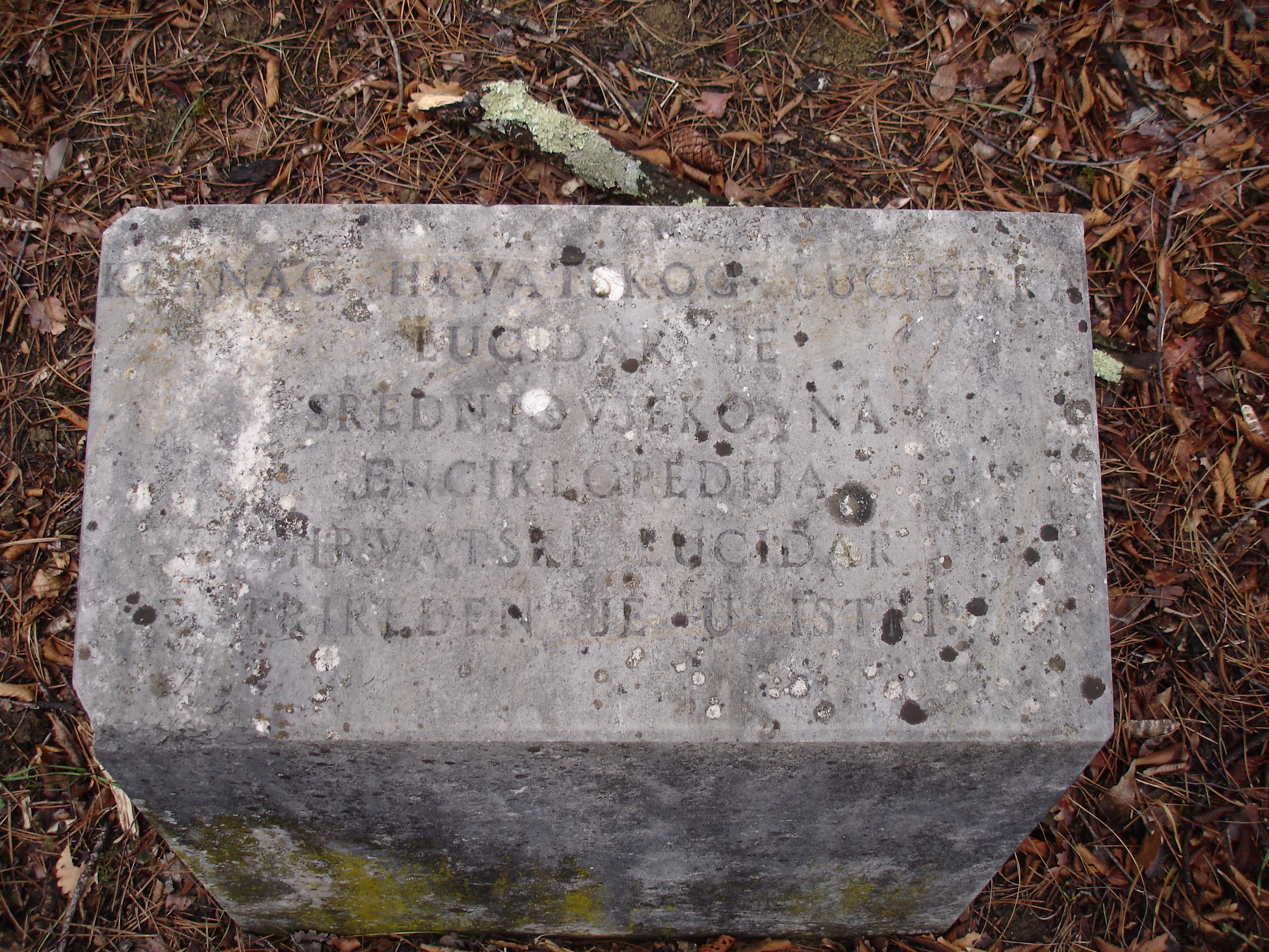 Ploča uz spomenik Klanac hrvatskog lucidara u Aleji glagoljaša u Istri